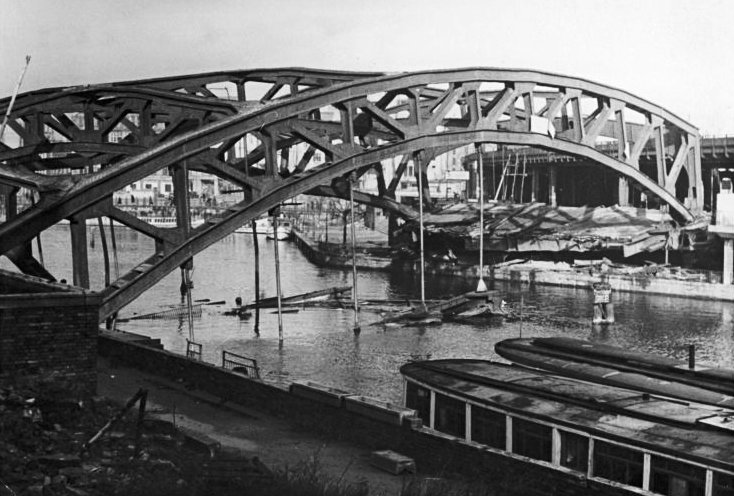 Berlin, Jannowitzbrücke, Ruine Die zerstörte Jannowitzbrücke (Berlin) Aufn.: Illus Funck 3 str 15.2.50